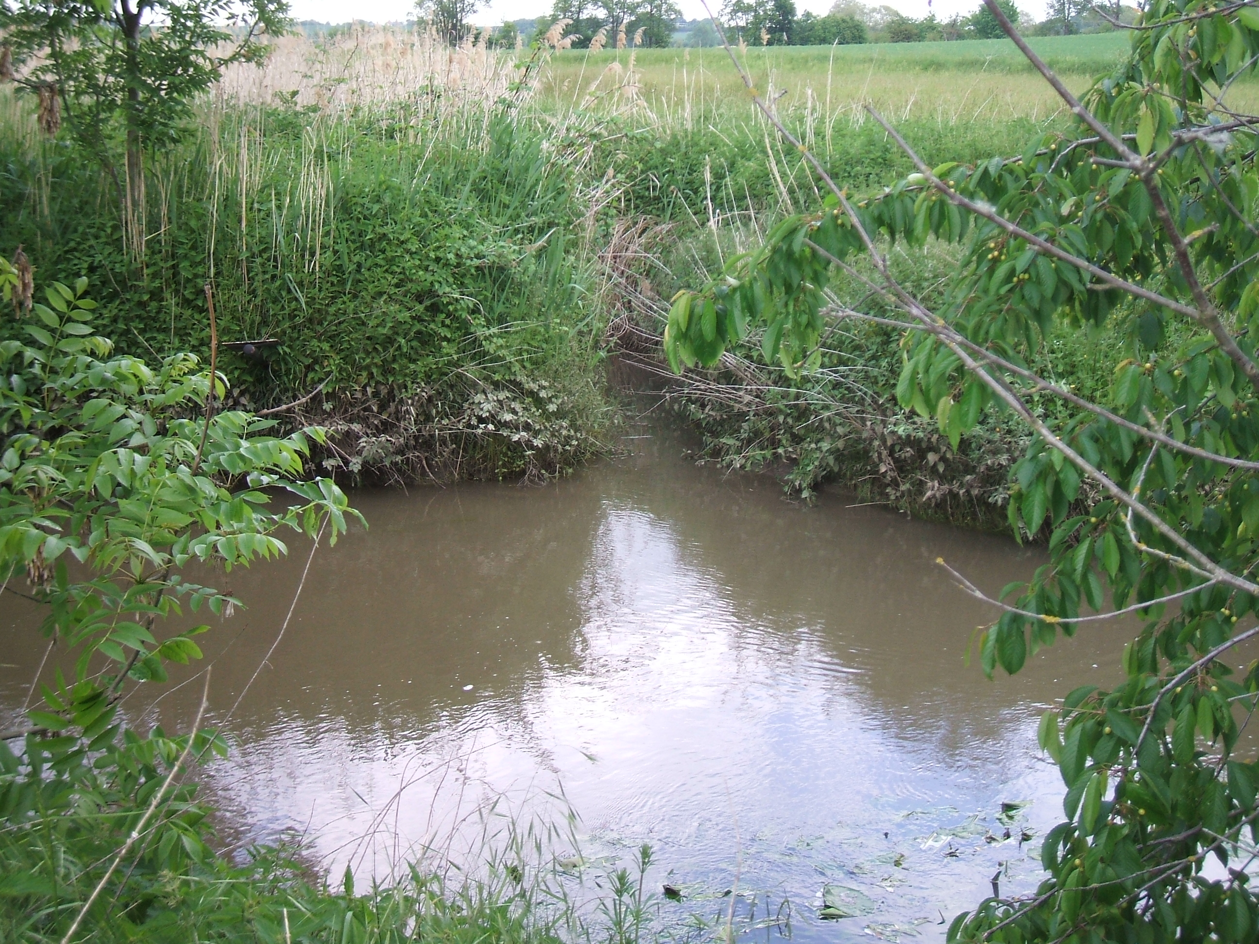 Der Hechtgraben mündet in Bauernheim von links und Norden in die Wetter. An seinem rechten Ufer liegt Dorheim, an seinem linken Ufer Bauernheim.